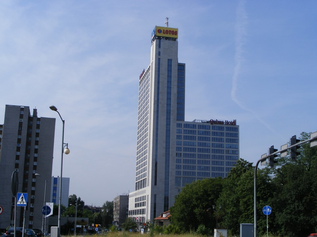 HOTEL QUBUS.